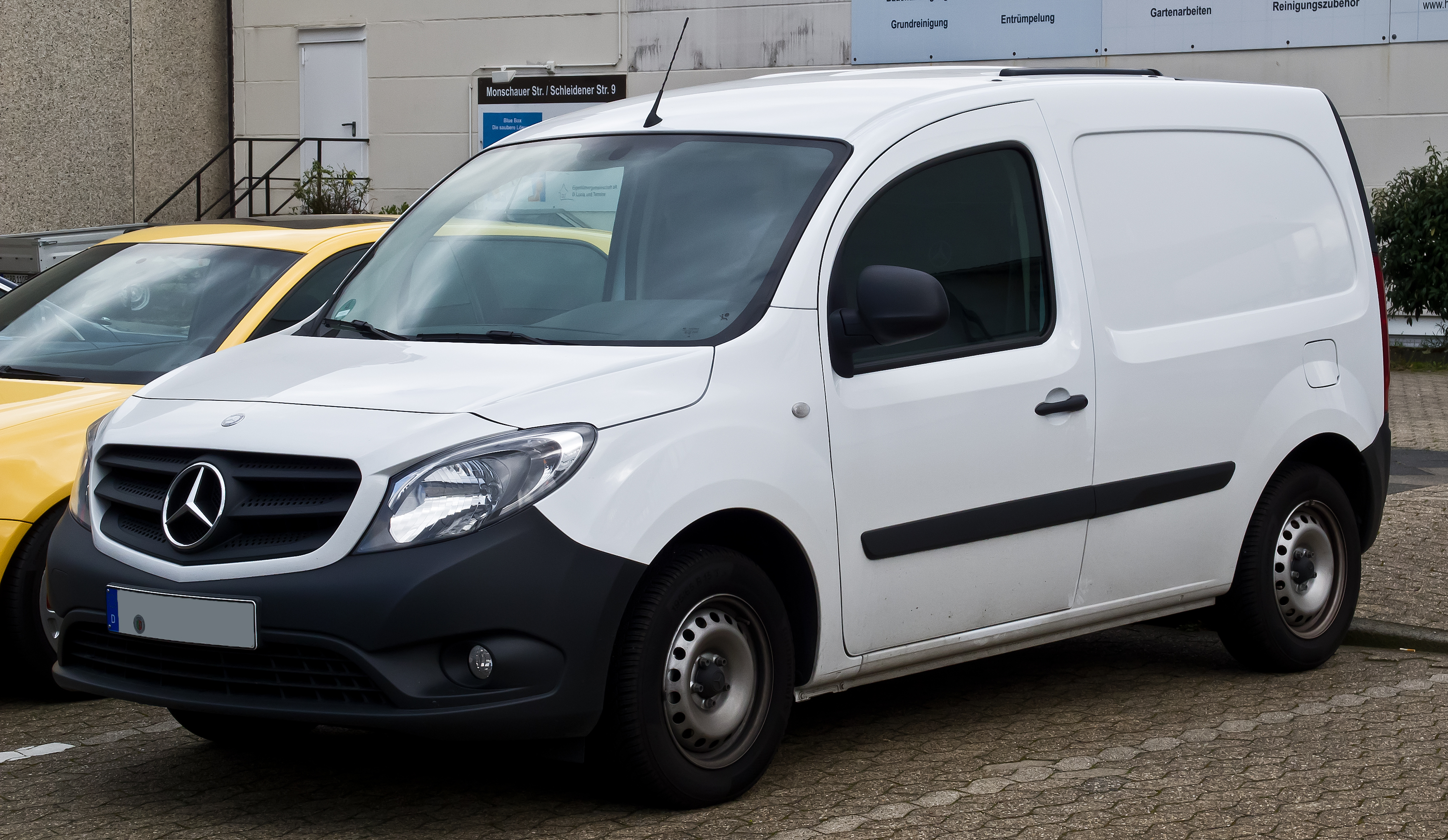 Mercedes-Benz Citan Kastenwagen Lang 108 CDI (W 415)